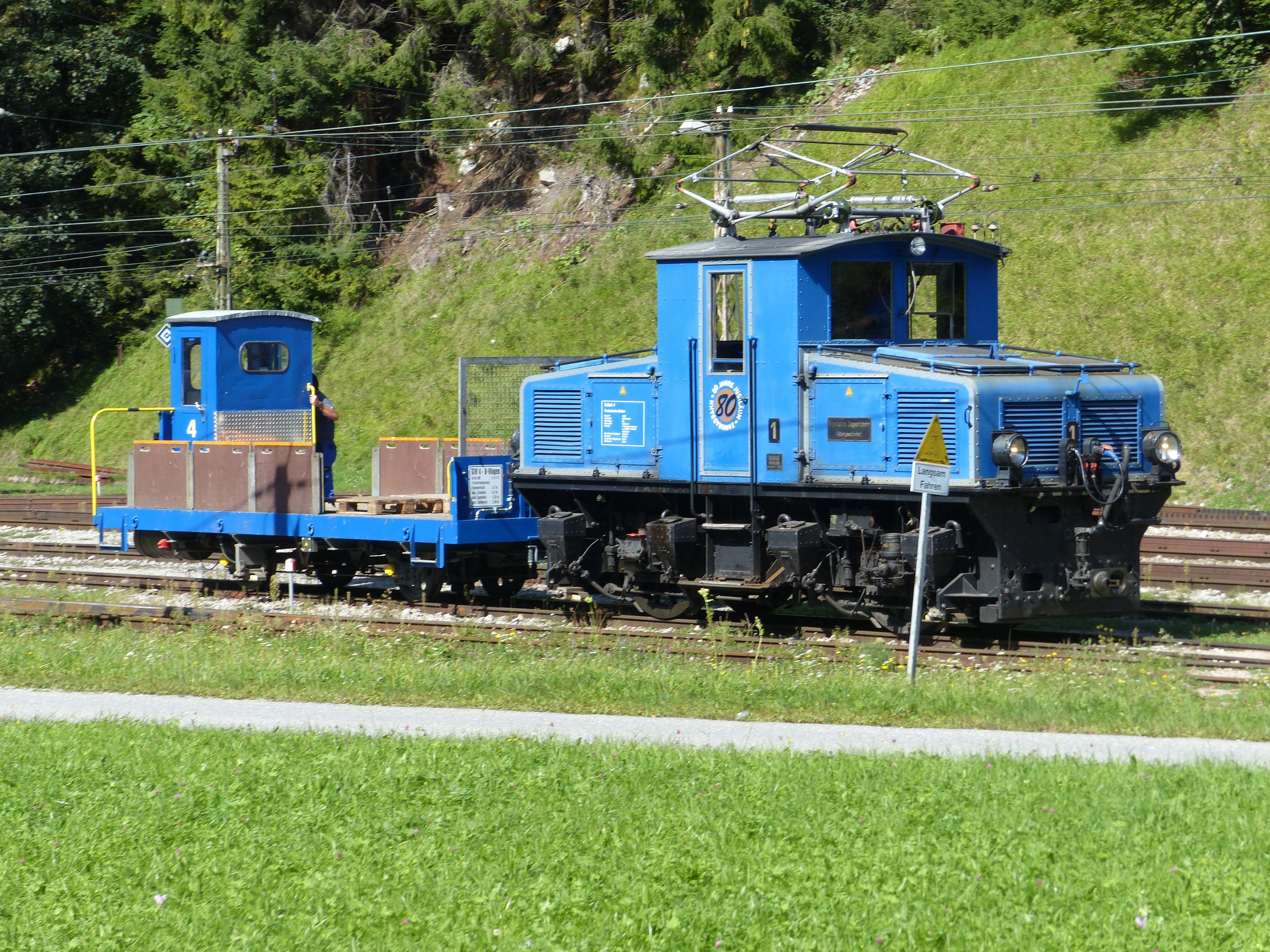 Bayerische Zugspitzbahn: Tallokomotive Nr. 1 im Betriebswerk Grainau mit Flachwagen Nr. 4